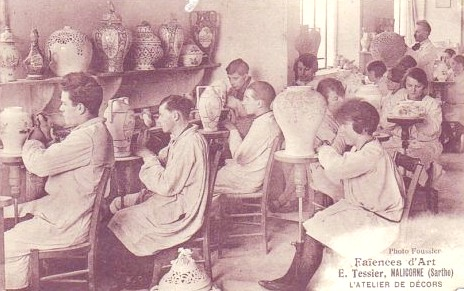 Atelier Emile Tessier, le décor. Malicorne, France, vers 1910